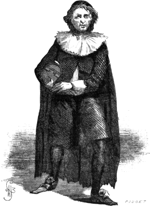 Harpagon de l'Avare de Molière.